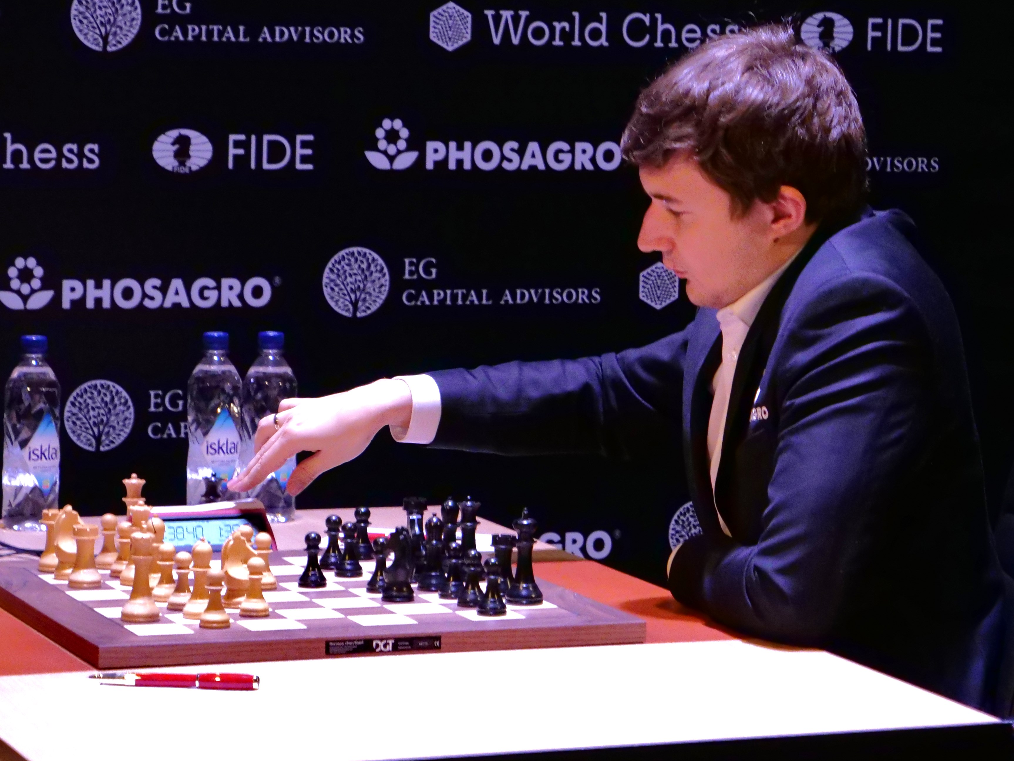 Karjakin-Grischtschuk-Kandidatenturnier Berlin 2018 Runde 10